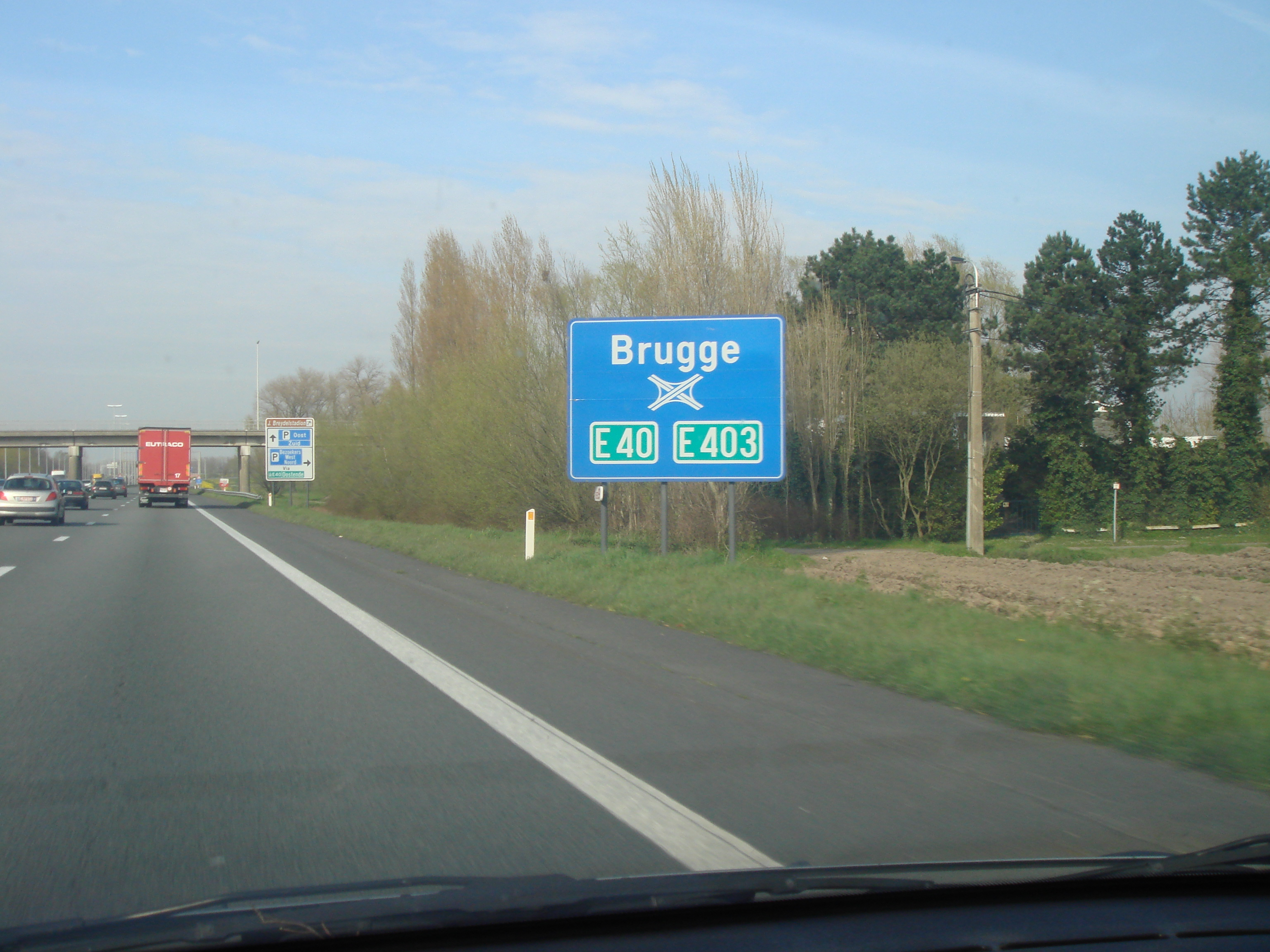 Echangeur de Bruges en Belgique